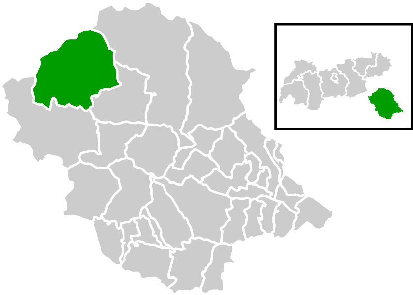 Lage der Gemeinde innerhalb des Bezirks Lienz